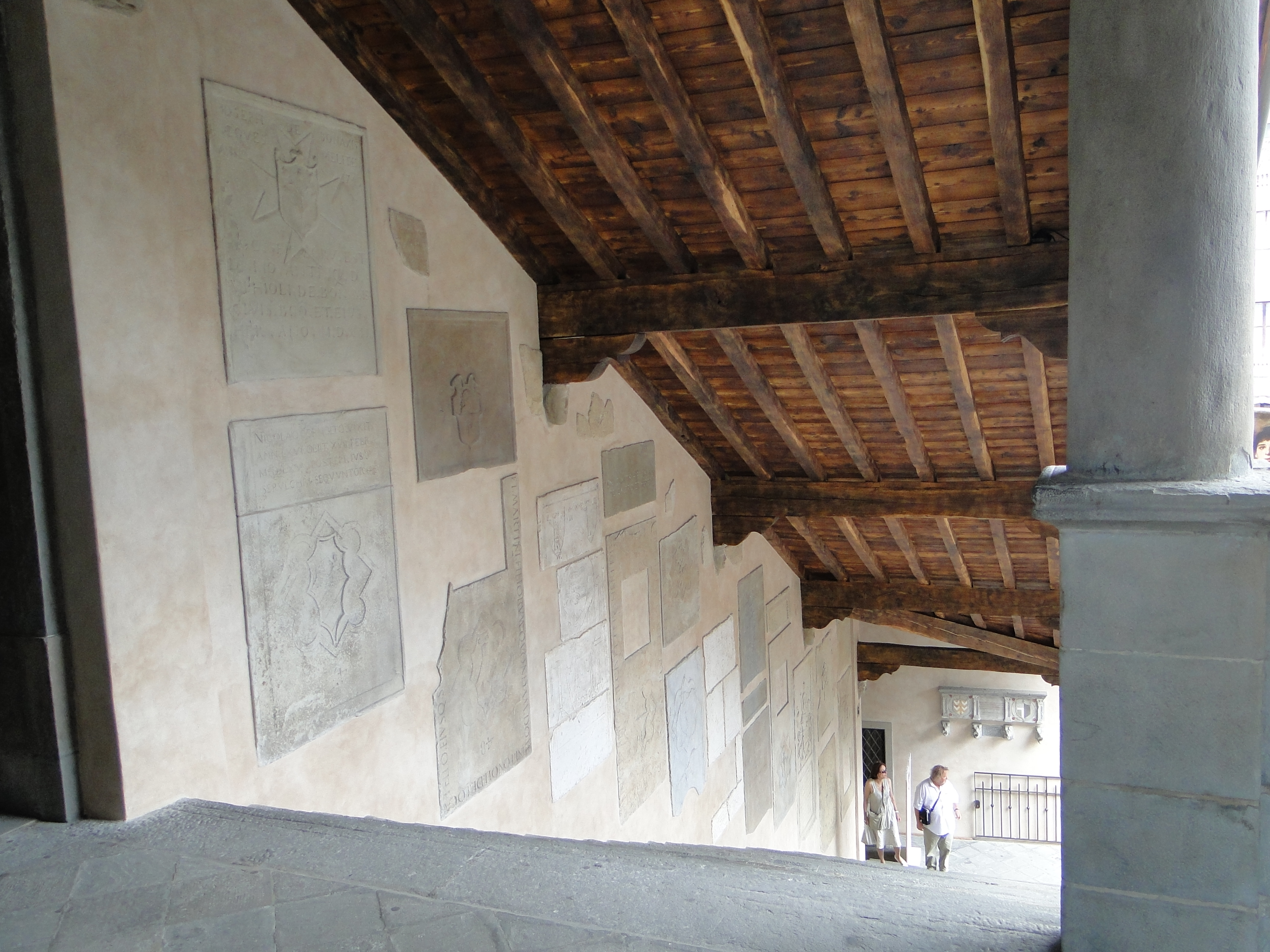 Scalinata di accesso al Palazzo della Ragione, Bergamo, Italia